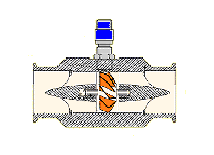 Schnitt Turbinen-Durchflussmesser